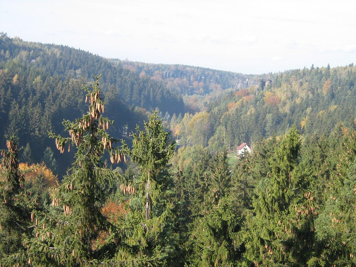 Das Bielatal in der Sächsischen Schweiz